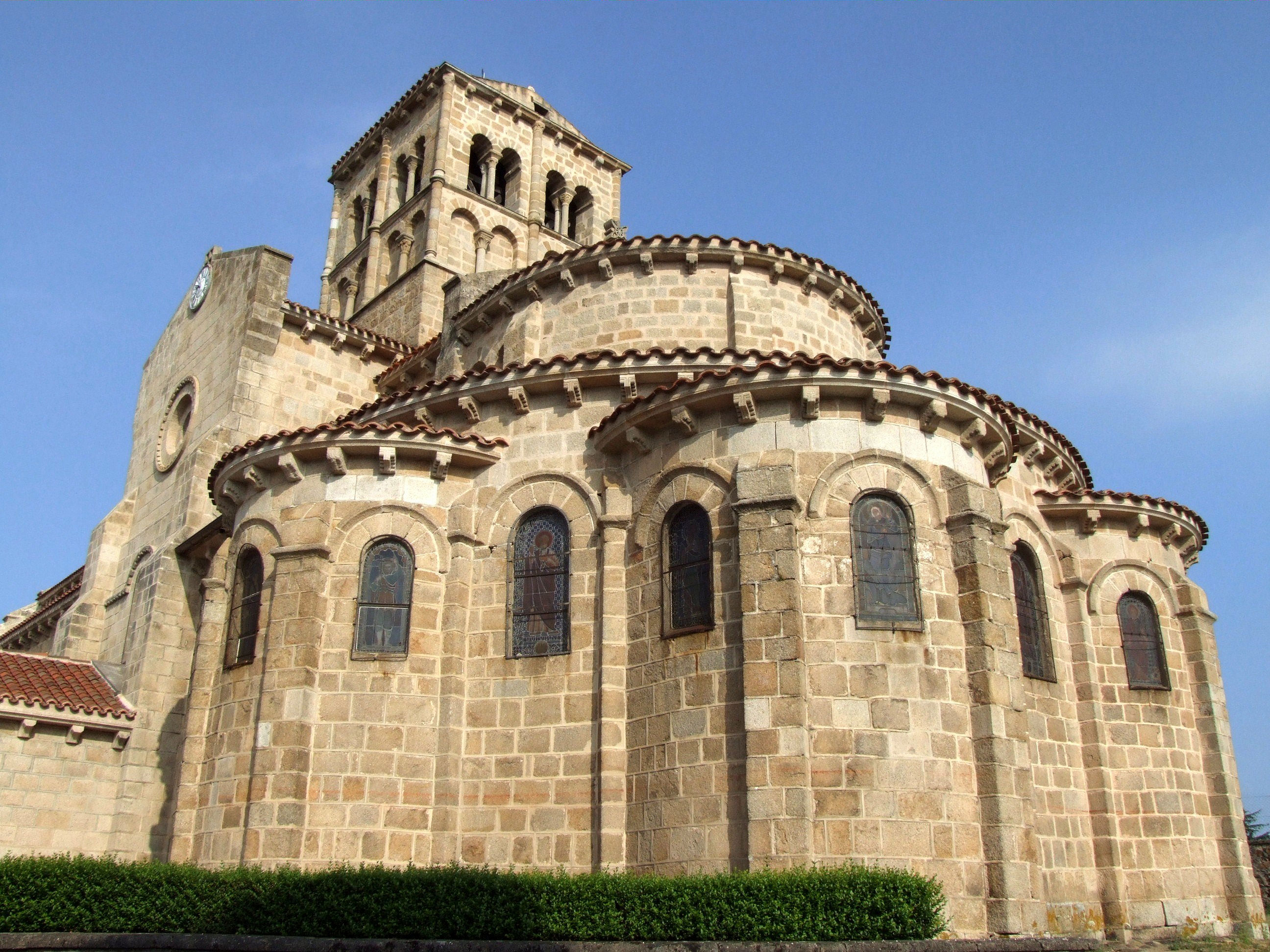 Châtel-Montagne - Eglise Notre-Dame - Chevet